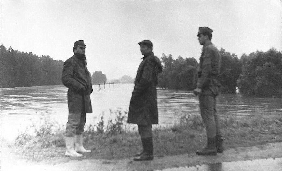 Żołnierze strażnicy Wojsk Ochrony Pogranicza Gorzyce, w czasie powodzi w miejscowości Olza, w rejonie mostu na rzece Odrze - pierwszy z prawej szer. Wojciech Janiszewski